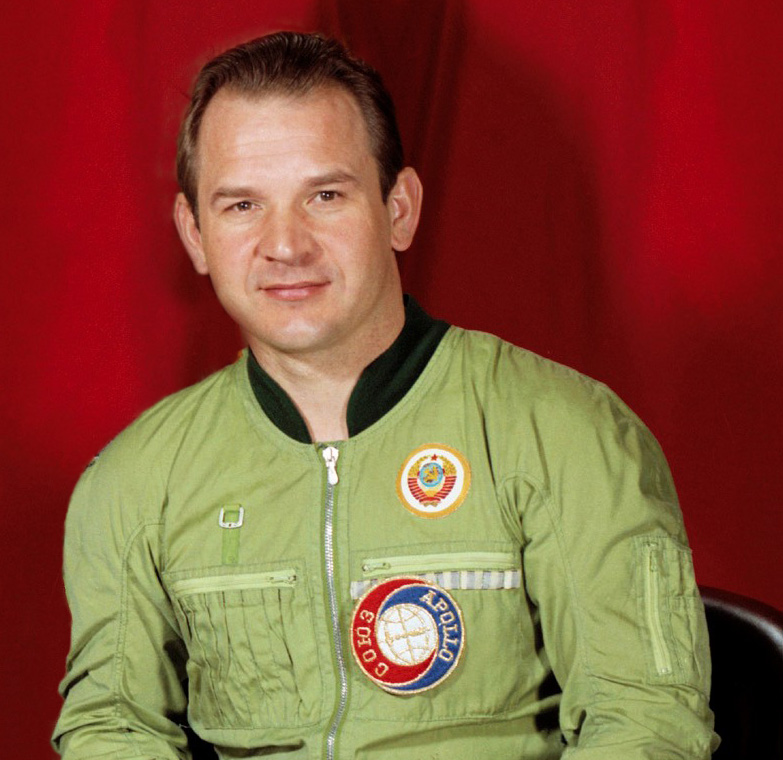 Valeri Kubasov (Apollo-Soyuz Test Project)